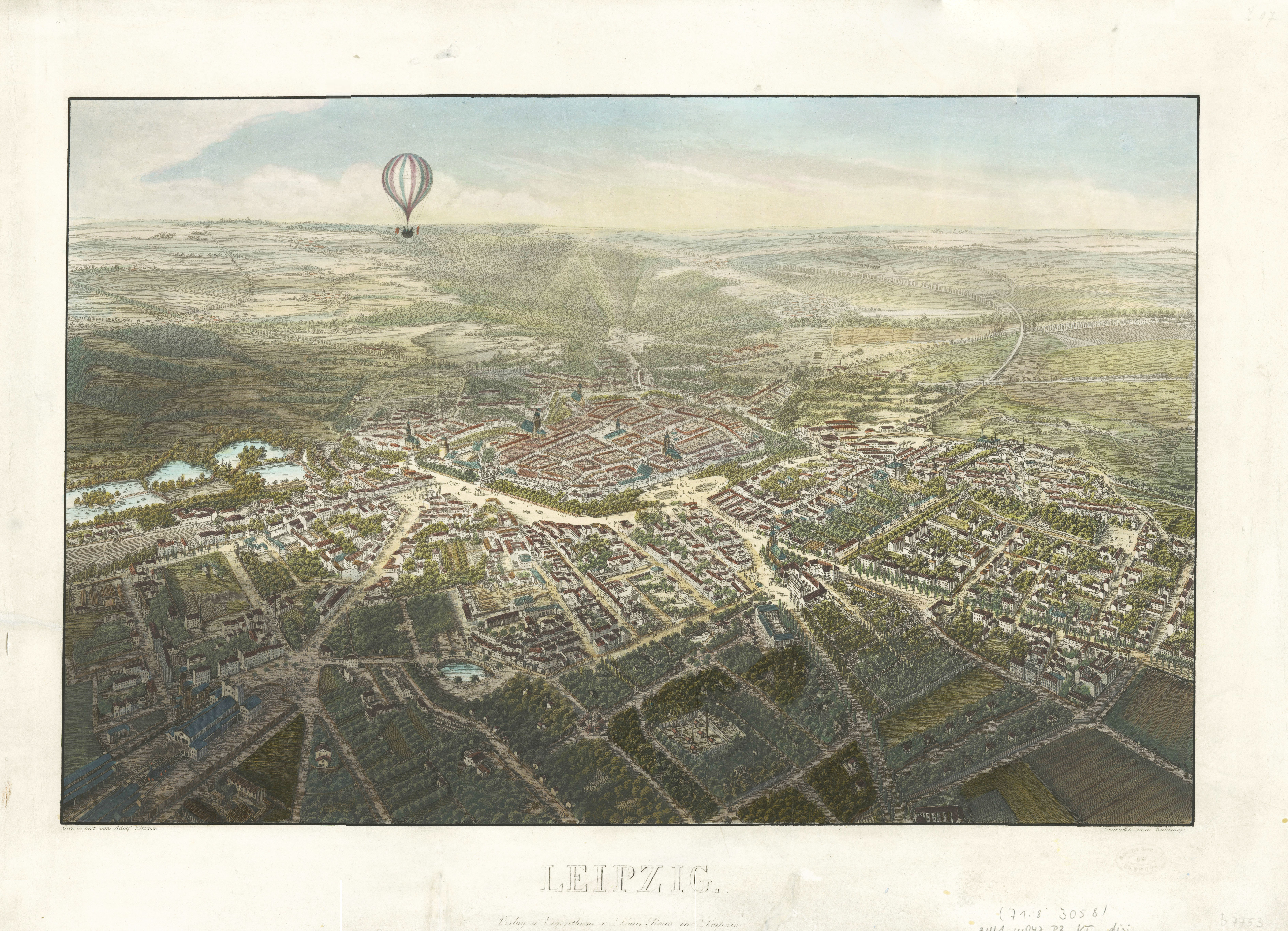 Leipzig. Gez. u. gest. von Adolf Eltzner. (Vogelschaubild) Verlag Louis Rocca, Leipzig kolorierte Radierung 43 × 28 cm